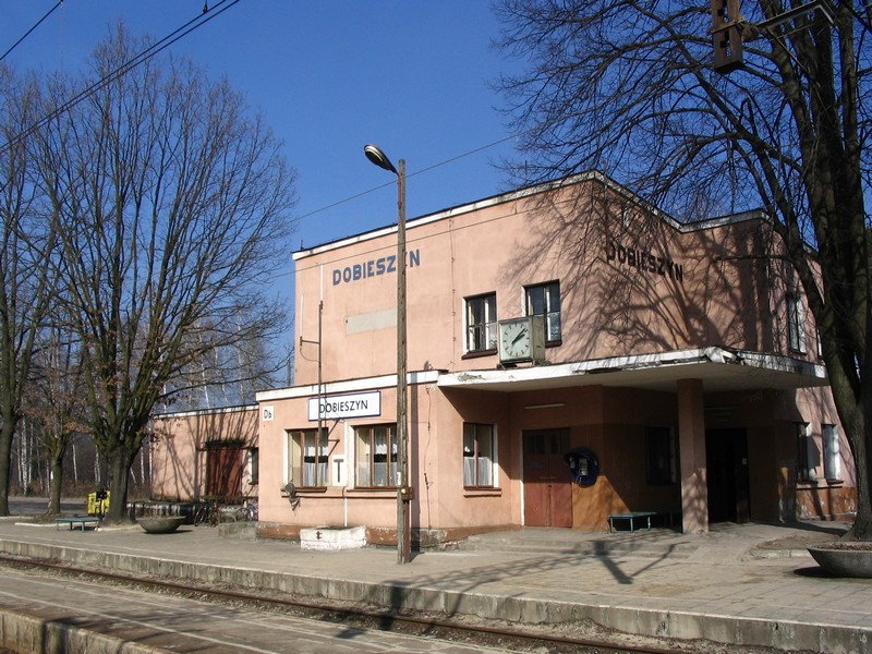 Dworzec kolejowy w Dobieszynie